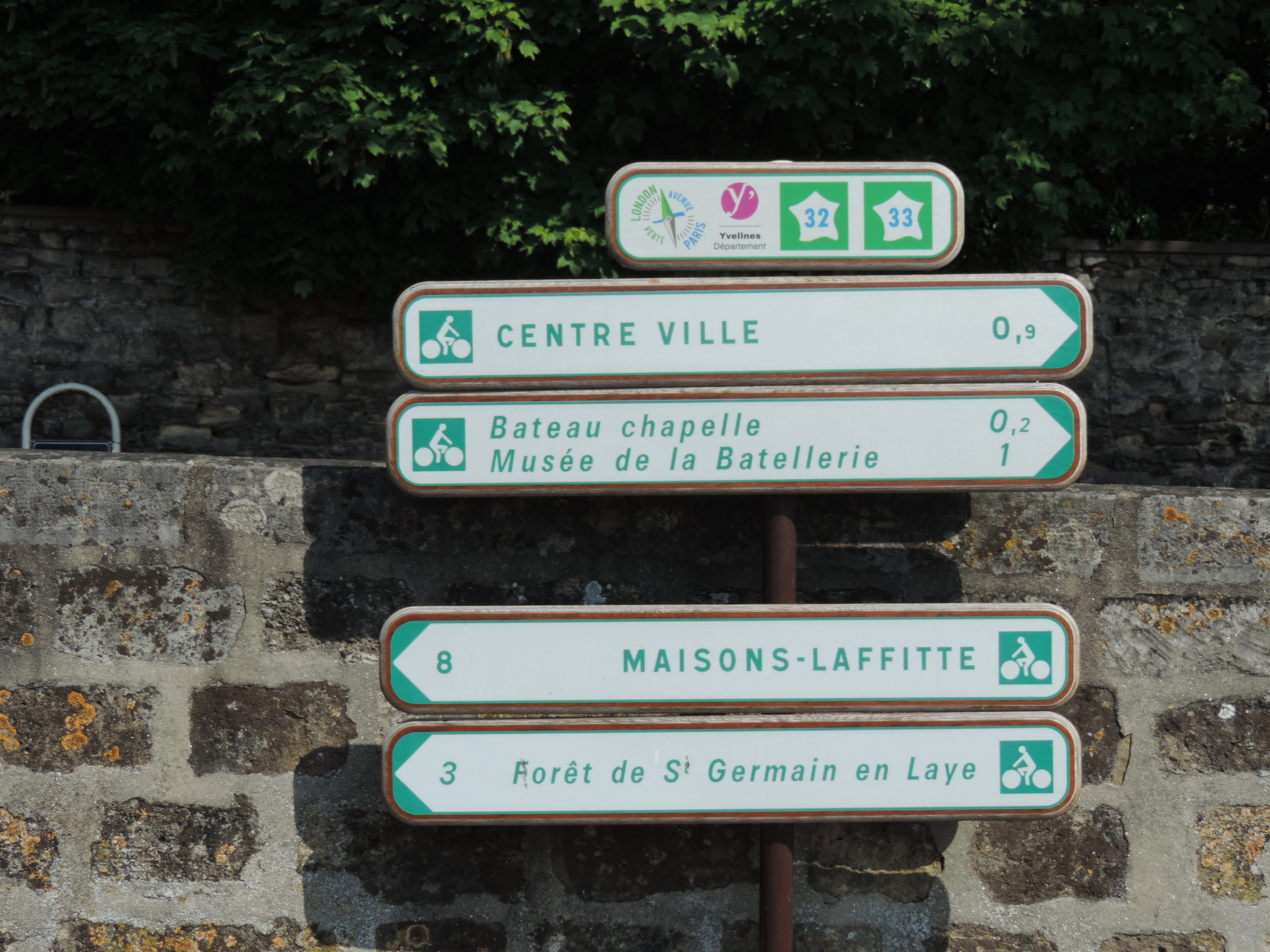 panneau indicateur de l'avenue verte paris londre à conflans Ste honorine - France